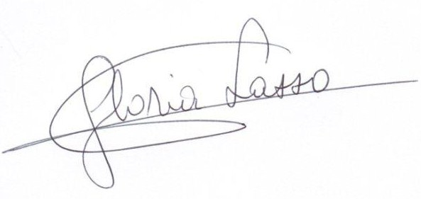 Autographe Gloria Lasso